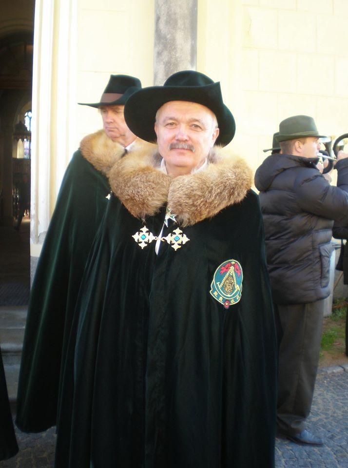 Ing. Jan Zasadil na Hubertské mši v Rudolfově u Českých Budějovic, 15.11.2015